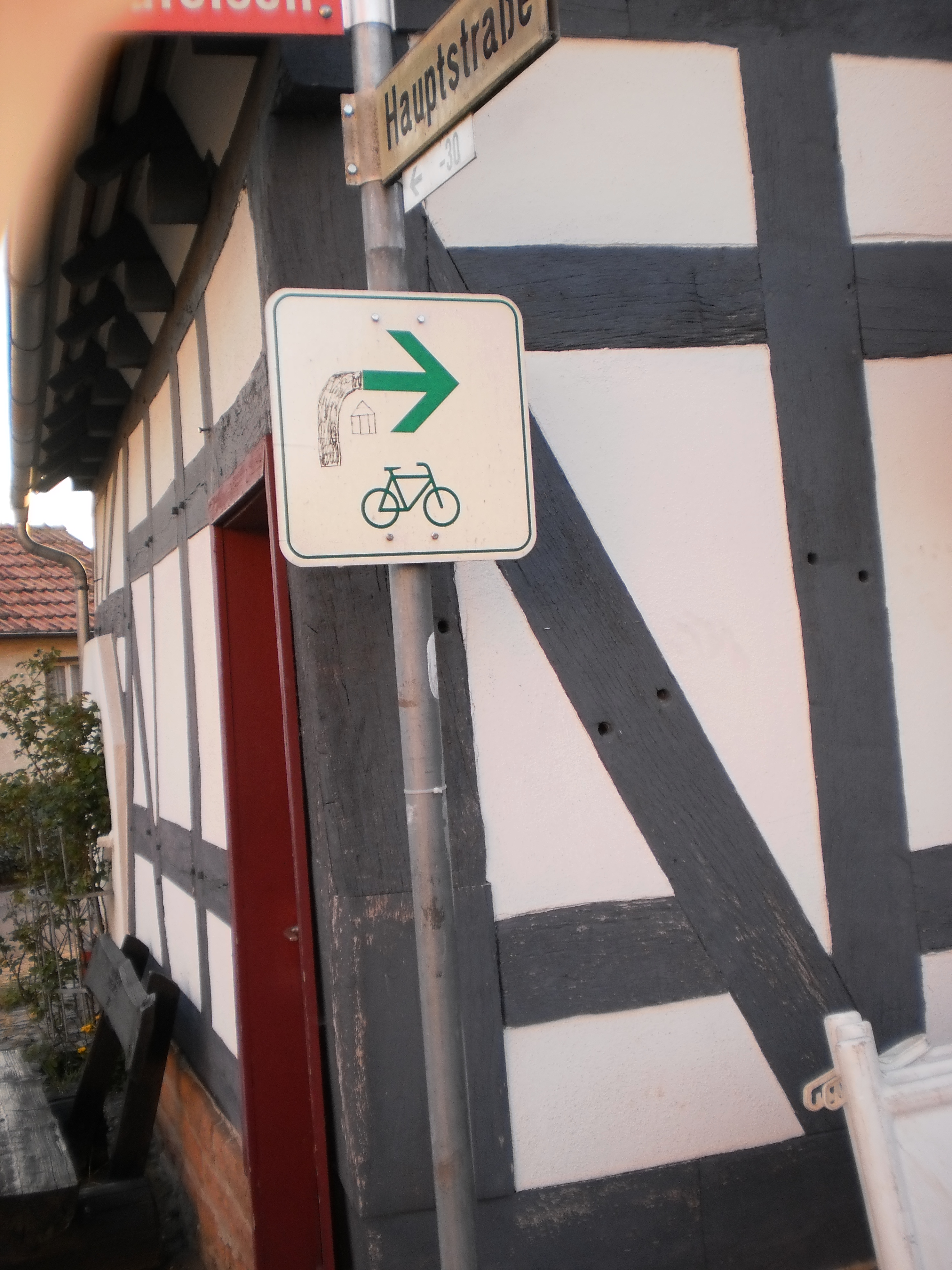 Radverkehrs-Wegweiser am Backhaus in Fronhausen, Ortsteil Sichertshausen. Der Lahntalradweg in Fahrtrichtung Giessen, sowie die auch als innerörtliche Radroute genutzte Verbindung zum Bahnhof an der Main-Weser-Bahn im Hauptort Fronhausen biegen hier an diesem Fachwerkgebäude scharf nach rechts ab.